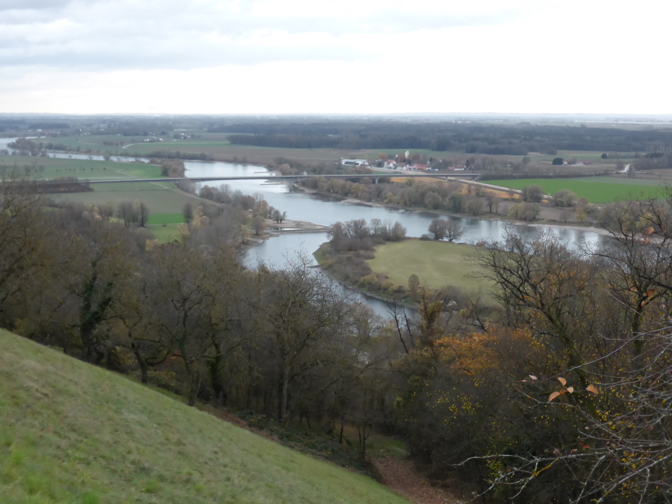 Blick vom Bogenberg auf die Xaver-Hafner-Brücke, die über die Donau führt. Im Hintergrund rechts die Ortschaft Ainbrach (Landkreis Straubing-Bogen). Die Brücke verbindet den Vorderen Bayerischen Wald mit dem Gäuboden. Neben dieser Brücke führen in der Stadt Straubing und im Landkreis Straubing-Bogen 4 weitere Straßenbrücken über die Donau Donaubrücke der B20, Schloßbrücke, Kagerser Brücke und Agnes-Bernauer-Brücke.